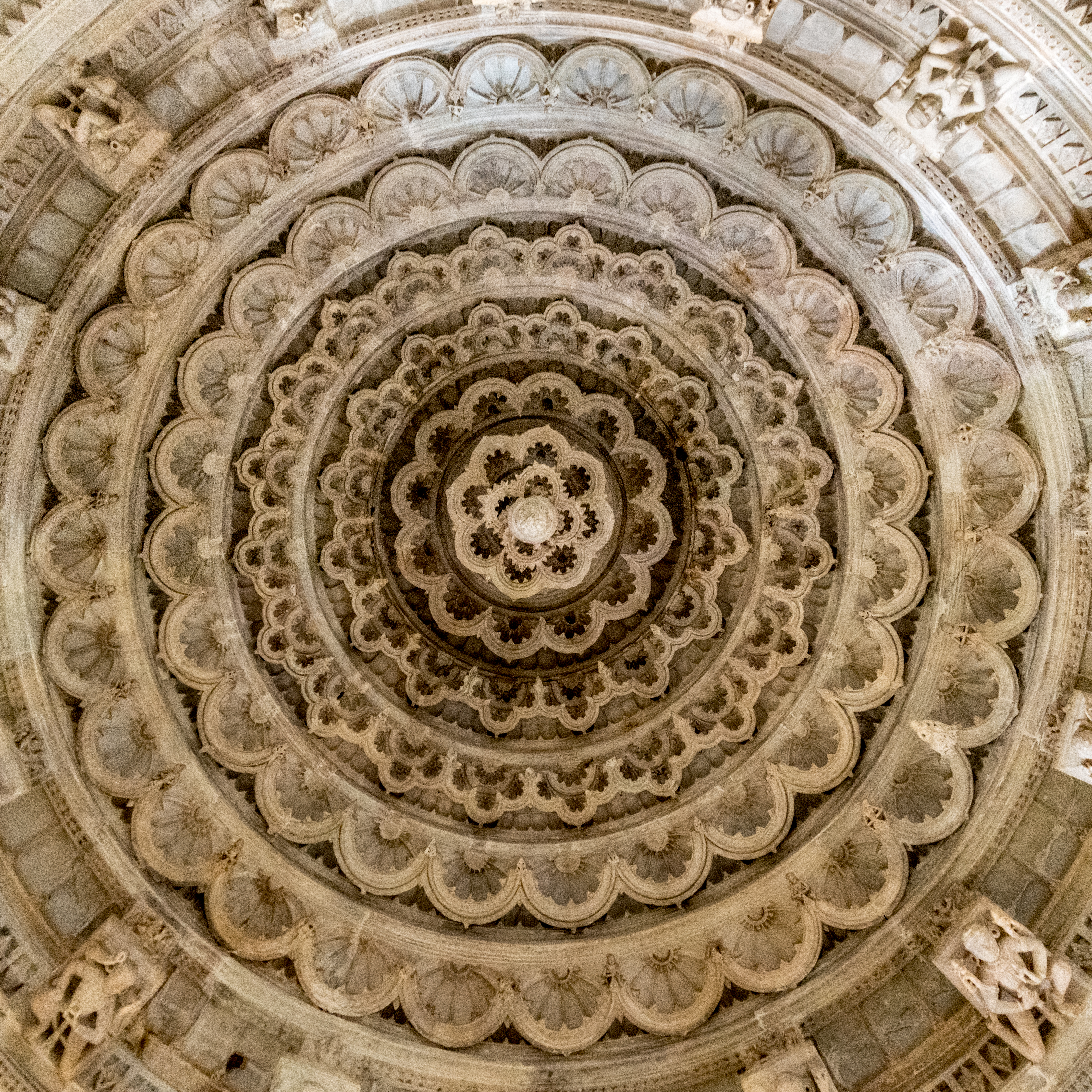 Kumbhariya Jain temple - Ceiling